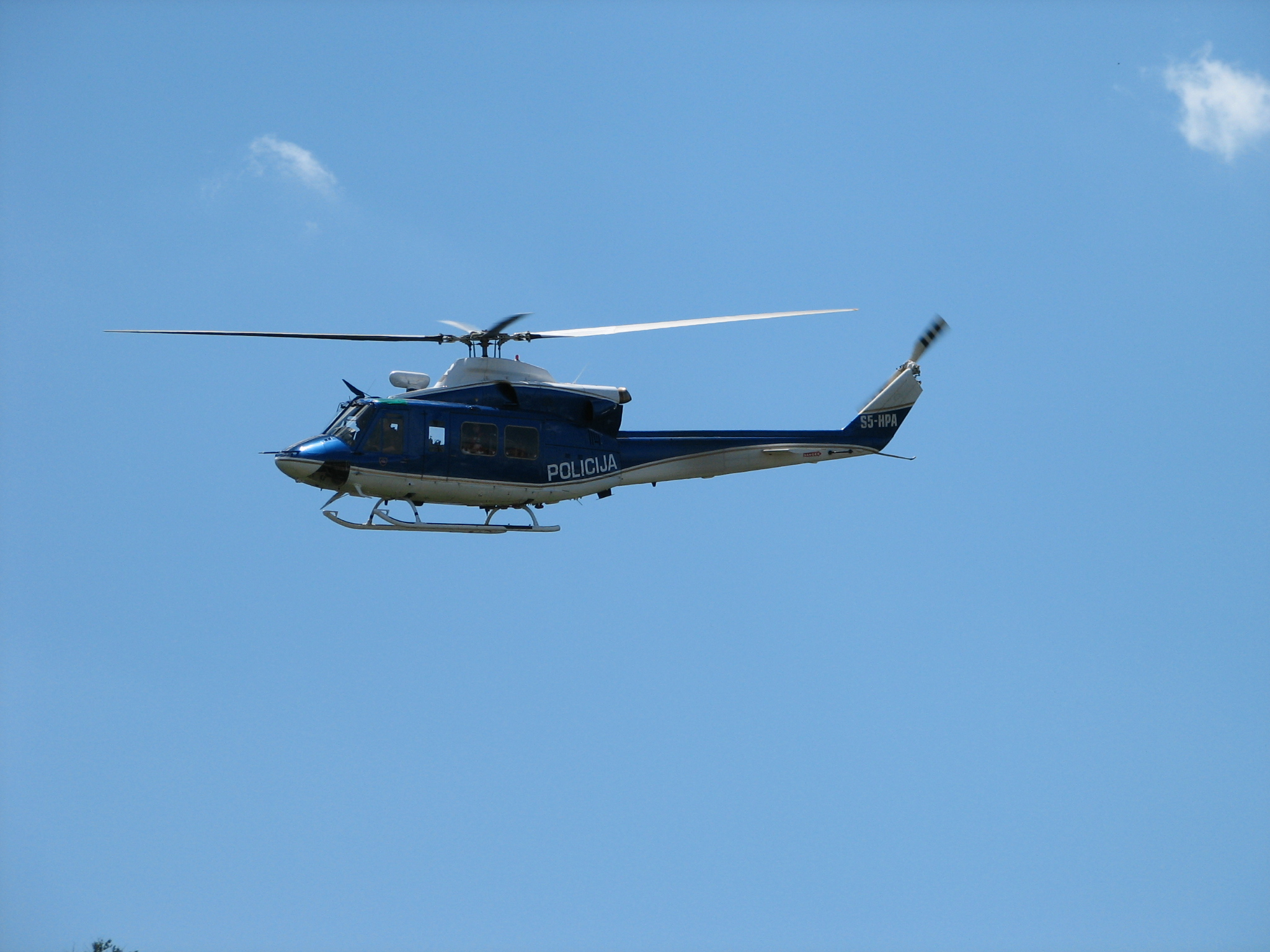 Slovenian police helicopter S5-HPA, model Agusta Bell AB-412